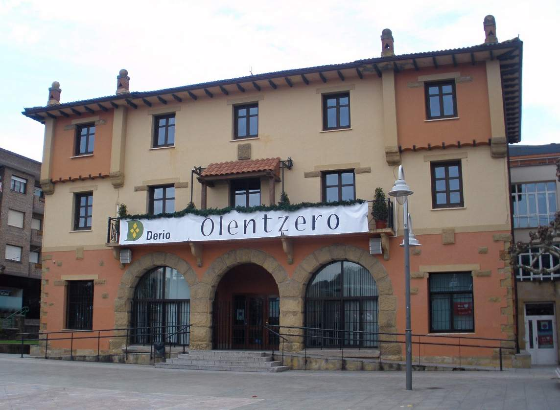 Derio (Bizkaia)